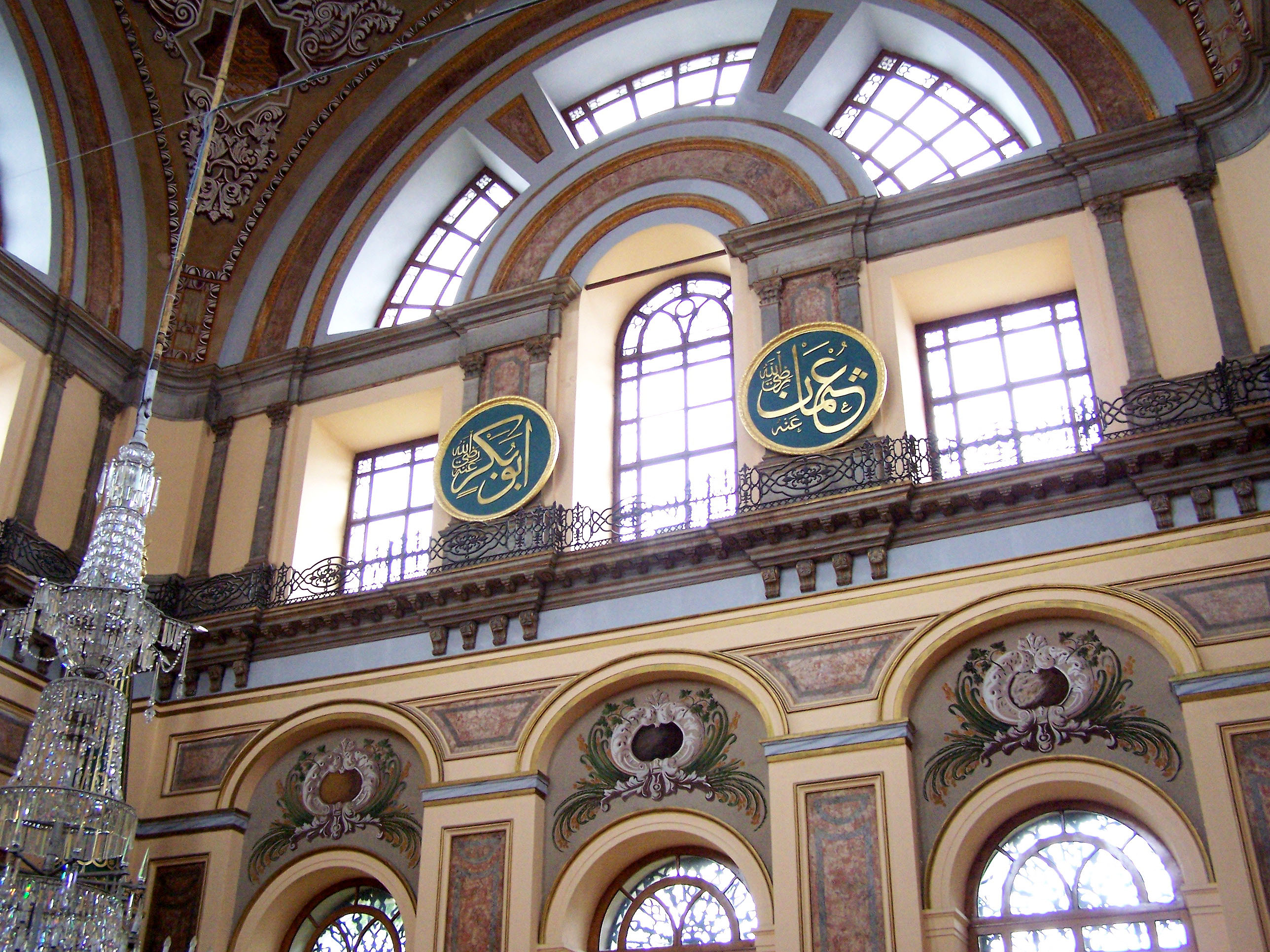 Interior of Bezm-i Alem Valide Sultan Camii (Dolmabahçe Camii) in Beşiktaş, İstanbul, Turkey